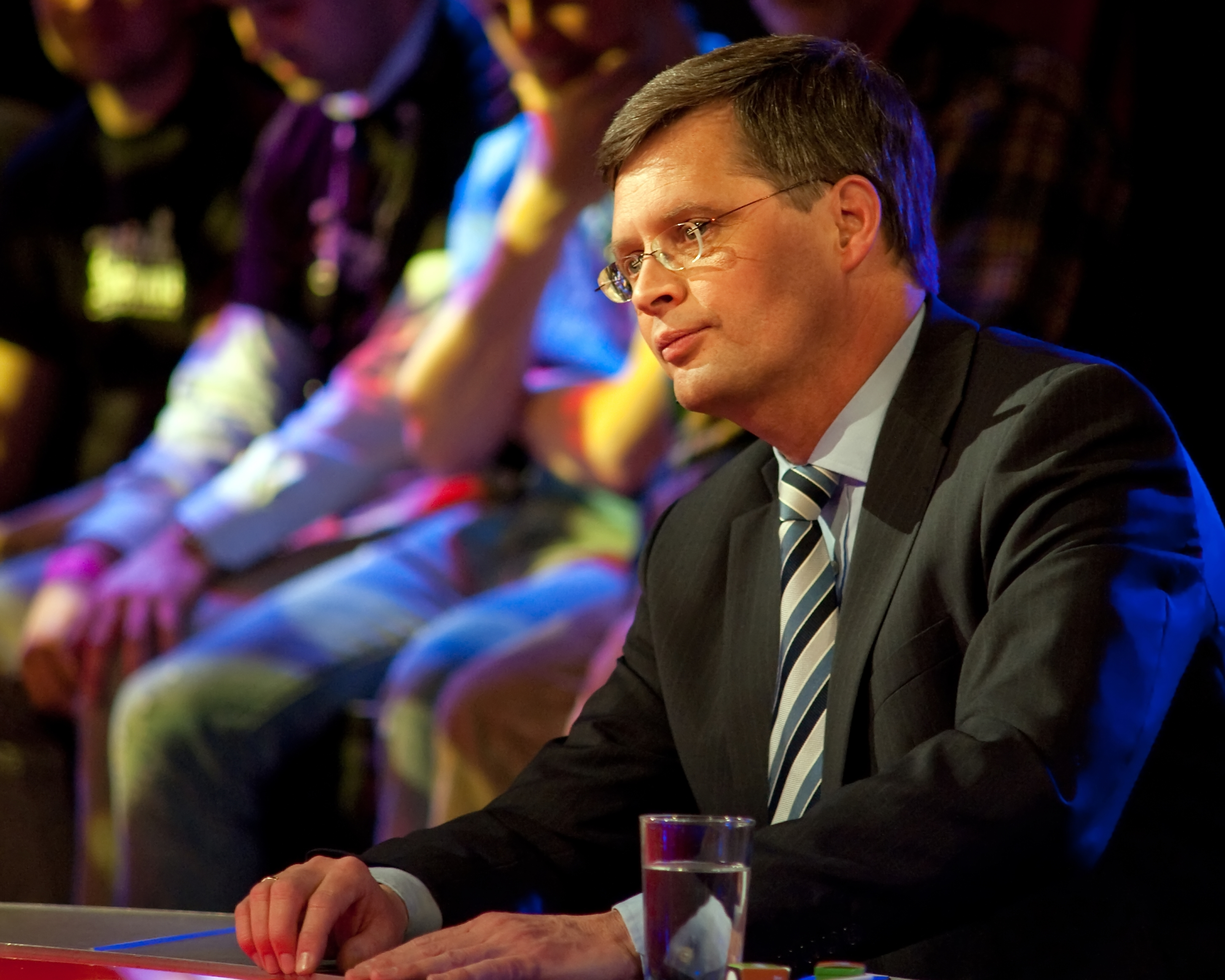 In de Amsterdamse Melkweg is Jan Peter Balkenende bij Pauw & Witteman.